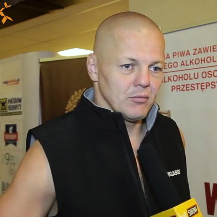 Artur Binkowski, polsko-kanadyjski pięściarz wagi ciężkiej.